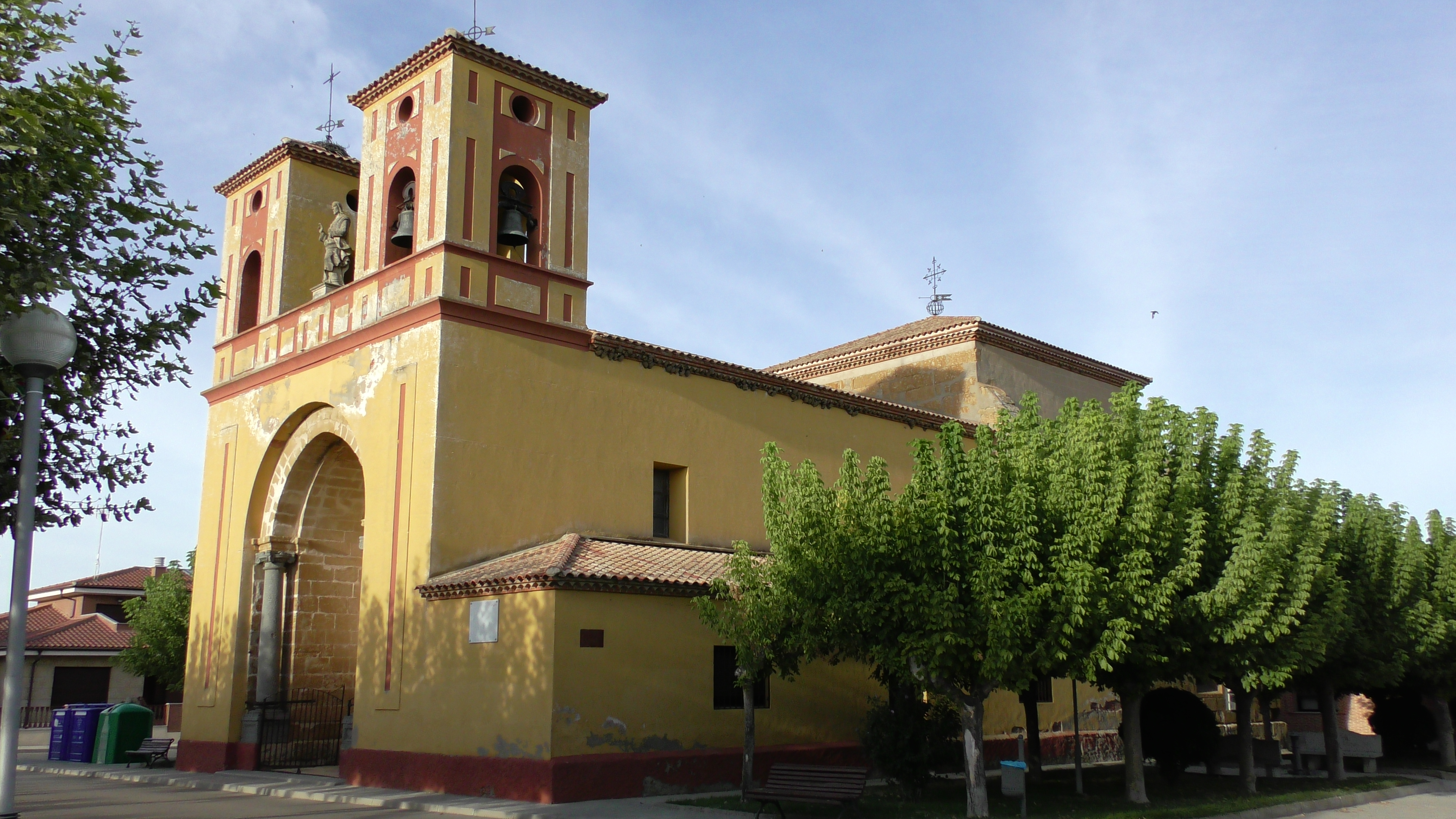 Villalazán